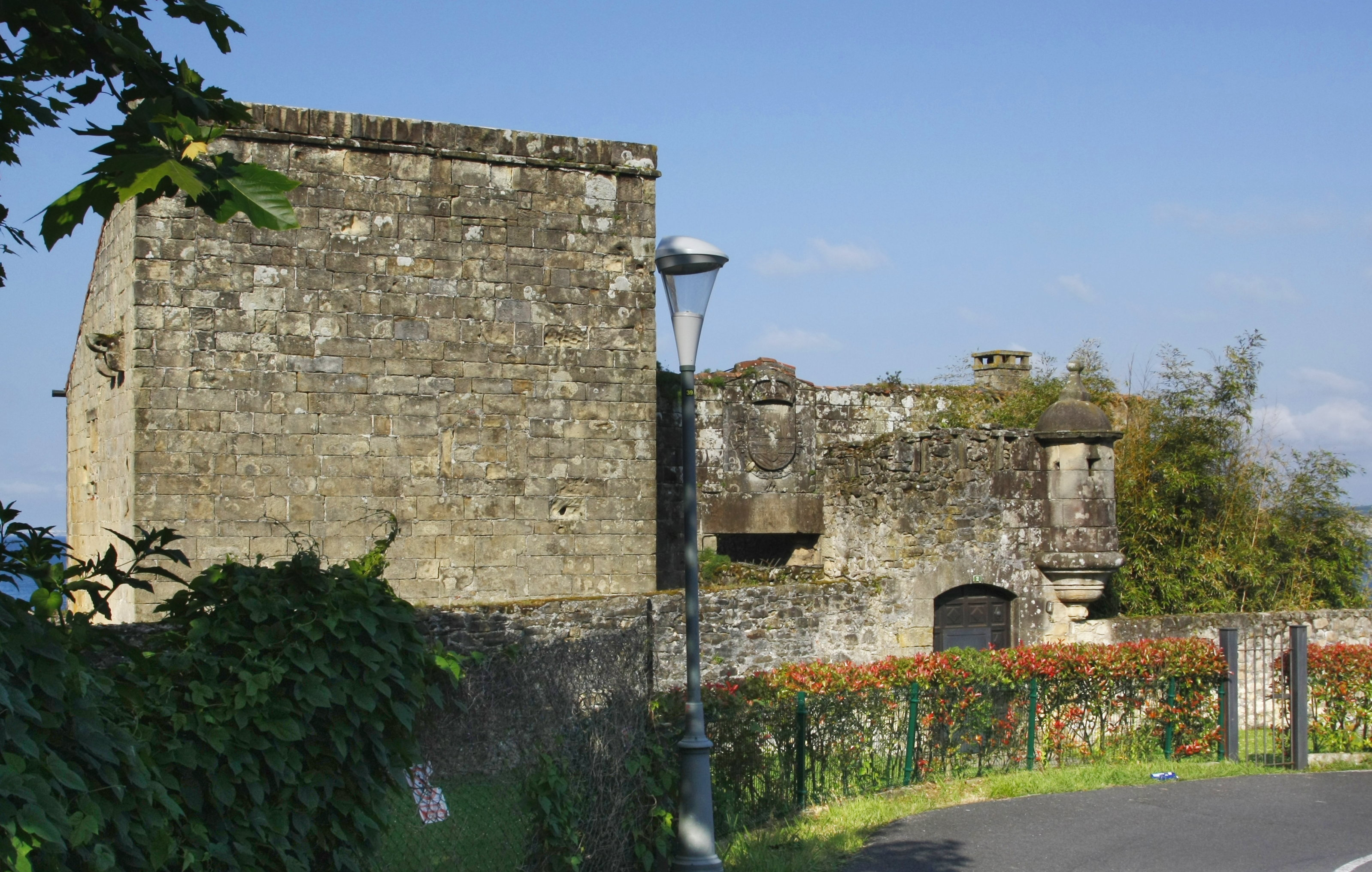 San Telmo gaztelua - Hondarribia